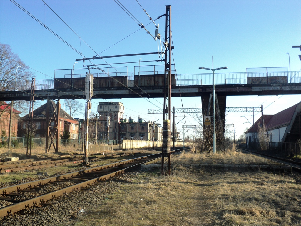 Stacja kolejowa Szczecin Skolwin